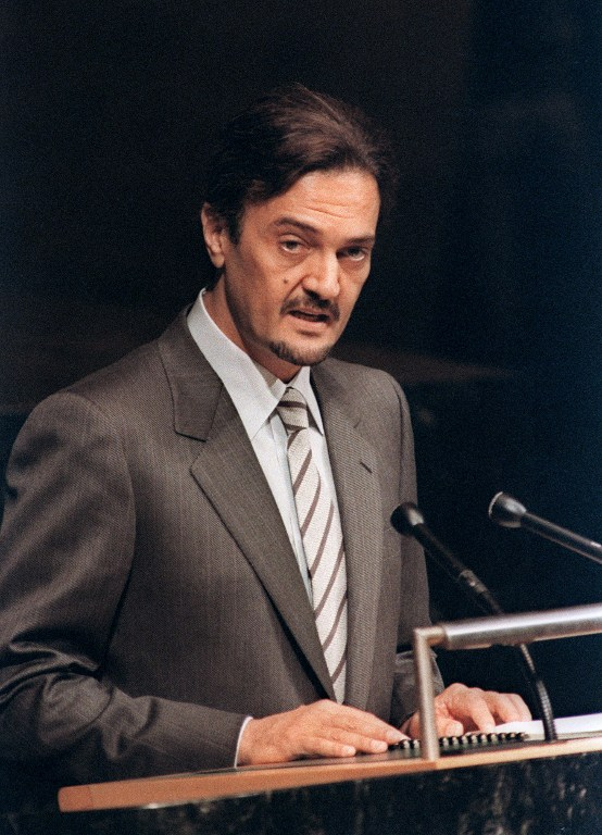 وزير الخارجية السعودي السابق سعود الفيصل في خطاب له في الأمم المتحدة سنة 1987.